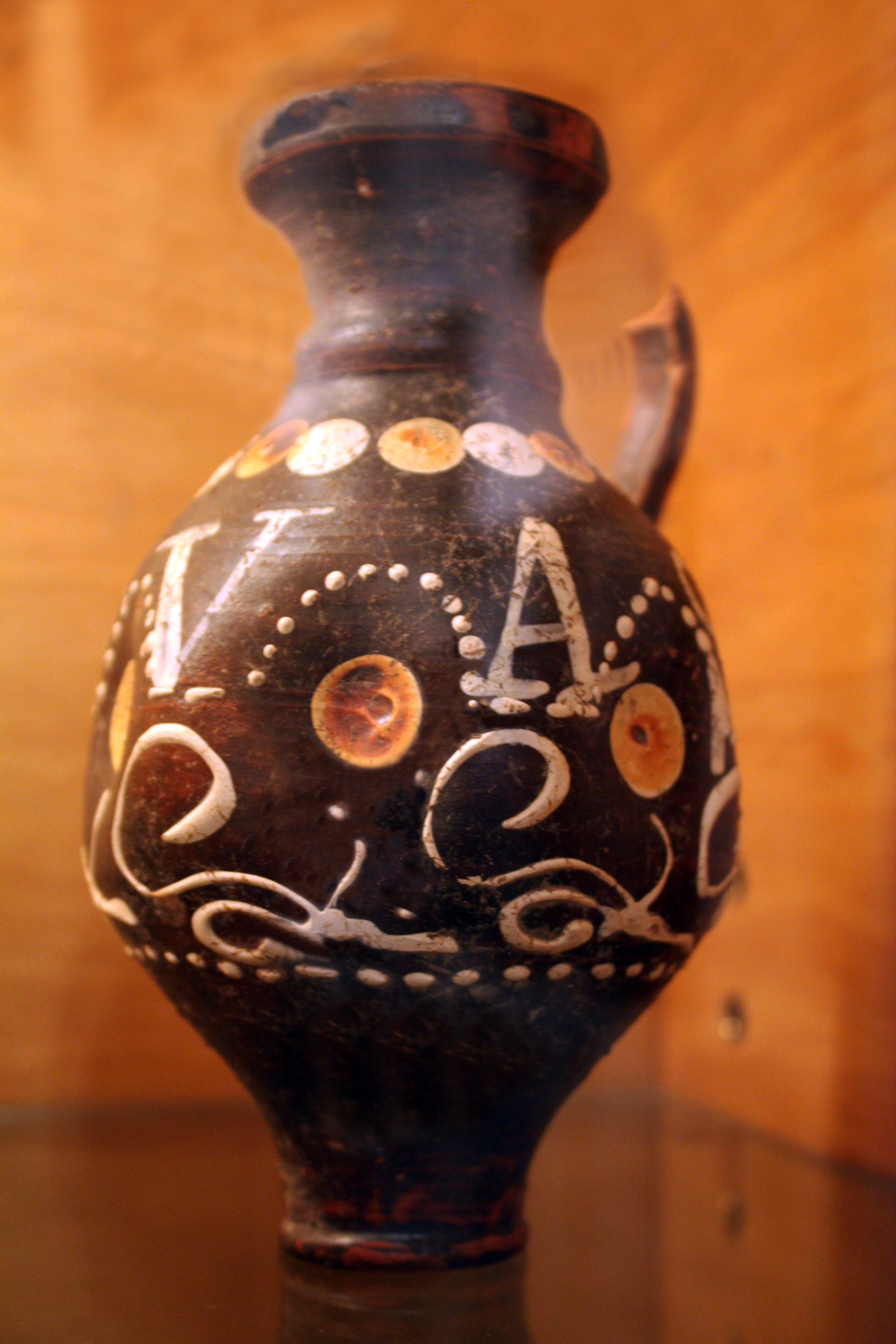 Römisches Wein- oder Spruchkrüglein, Henkelkrug, 3. Jahrhundert. Rottonig, schwarzer Überzug mit weißer Tonschlammkreide bemalt. Aufschrift: VIVAS, du mögest leben- auf dein Wohl. FO, Köln-Südstadt